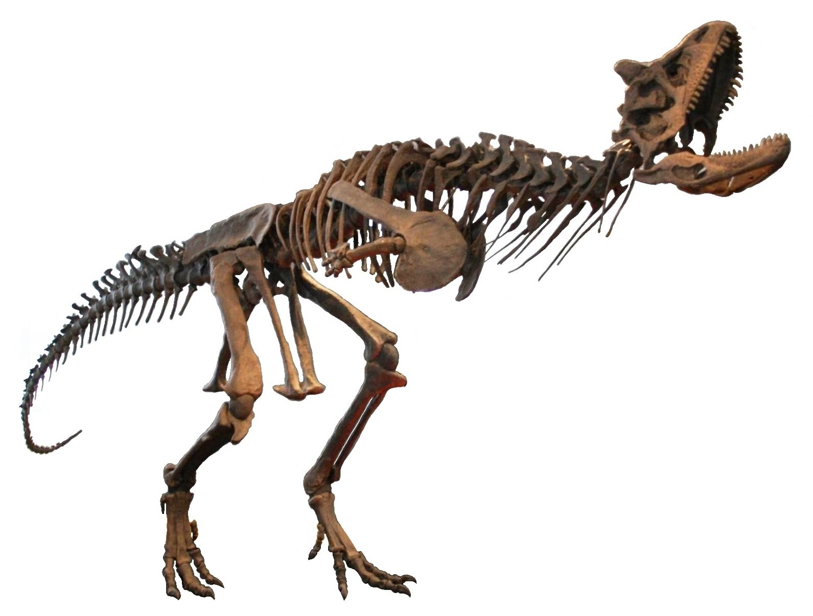 Carnotaurus exhibit in Bonn